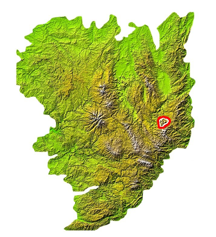 Situation des Monts du Meygal sur la carte du Massif central